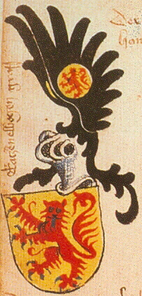 Ingeram-Codex der ehemaligen Bibliothek Cotta Katzenelnbogen freigestellt aus